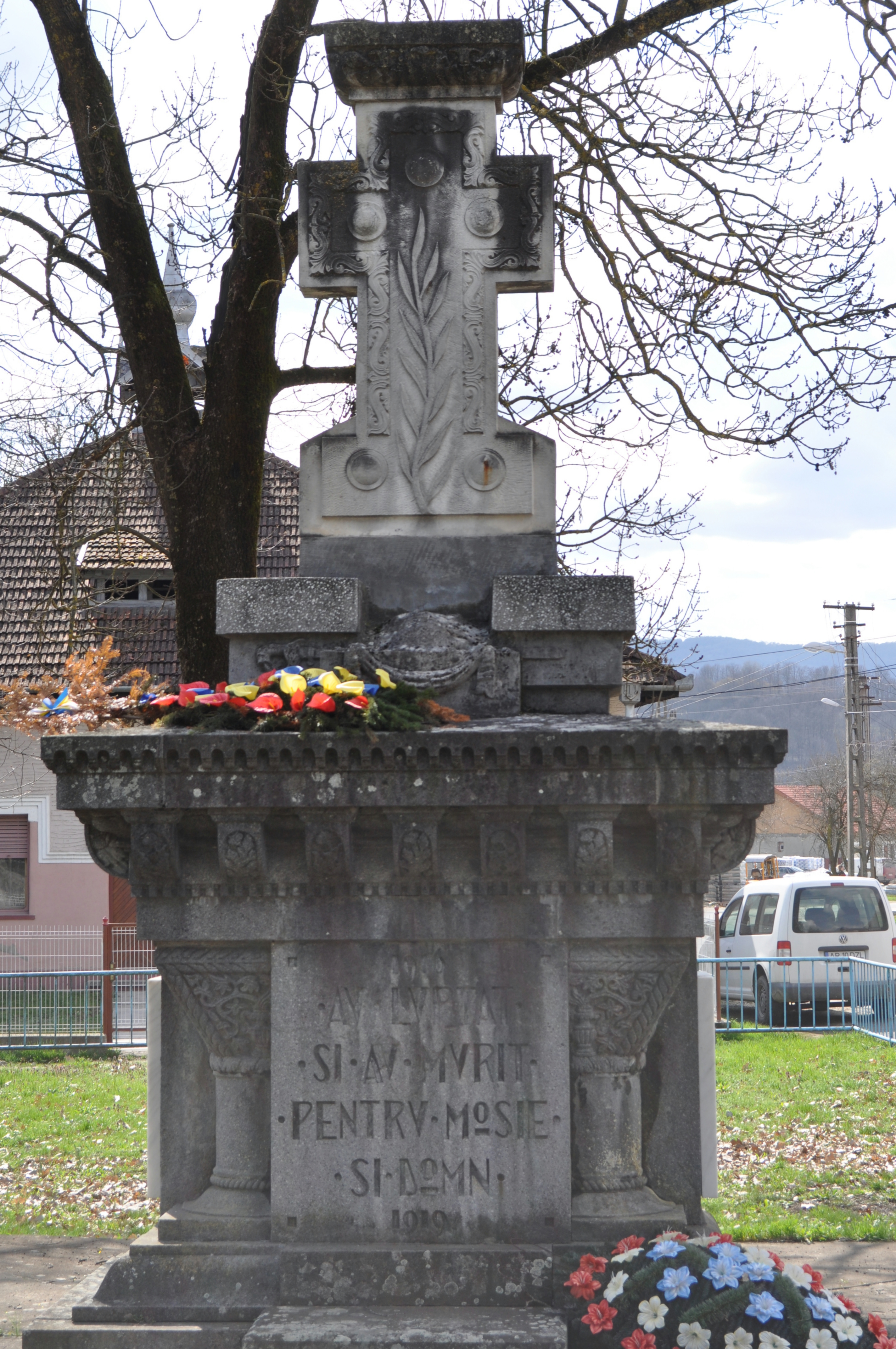 Monumentul Eroilor neamului, sat HĂLMAGIU; comuna HĂLMAGIU